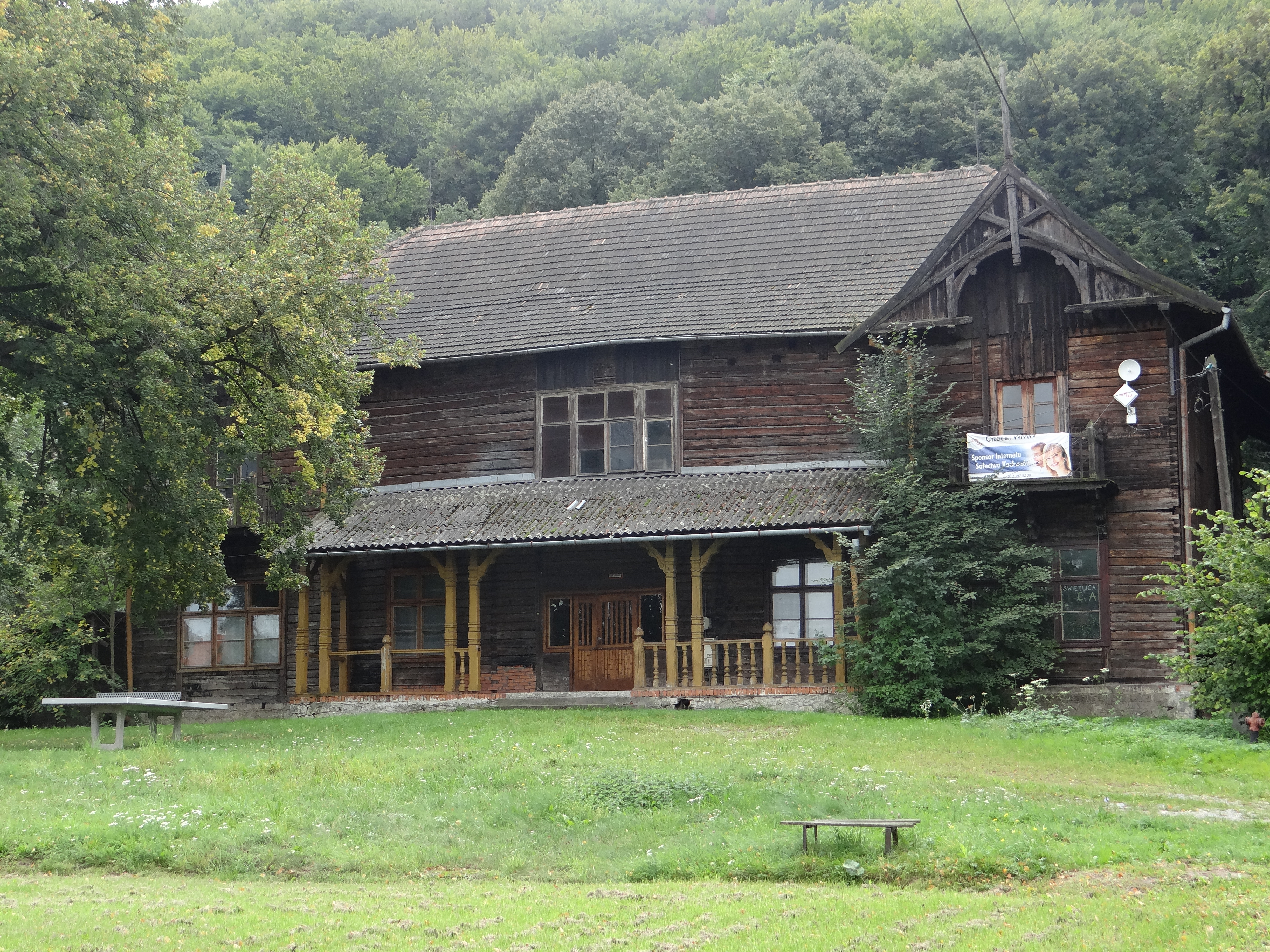 Kochanów - willa, drewn. 1896 (zabytek nr A-446/M i A-662 z 28.09.1993)